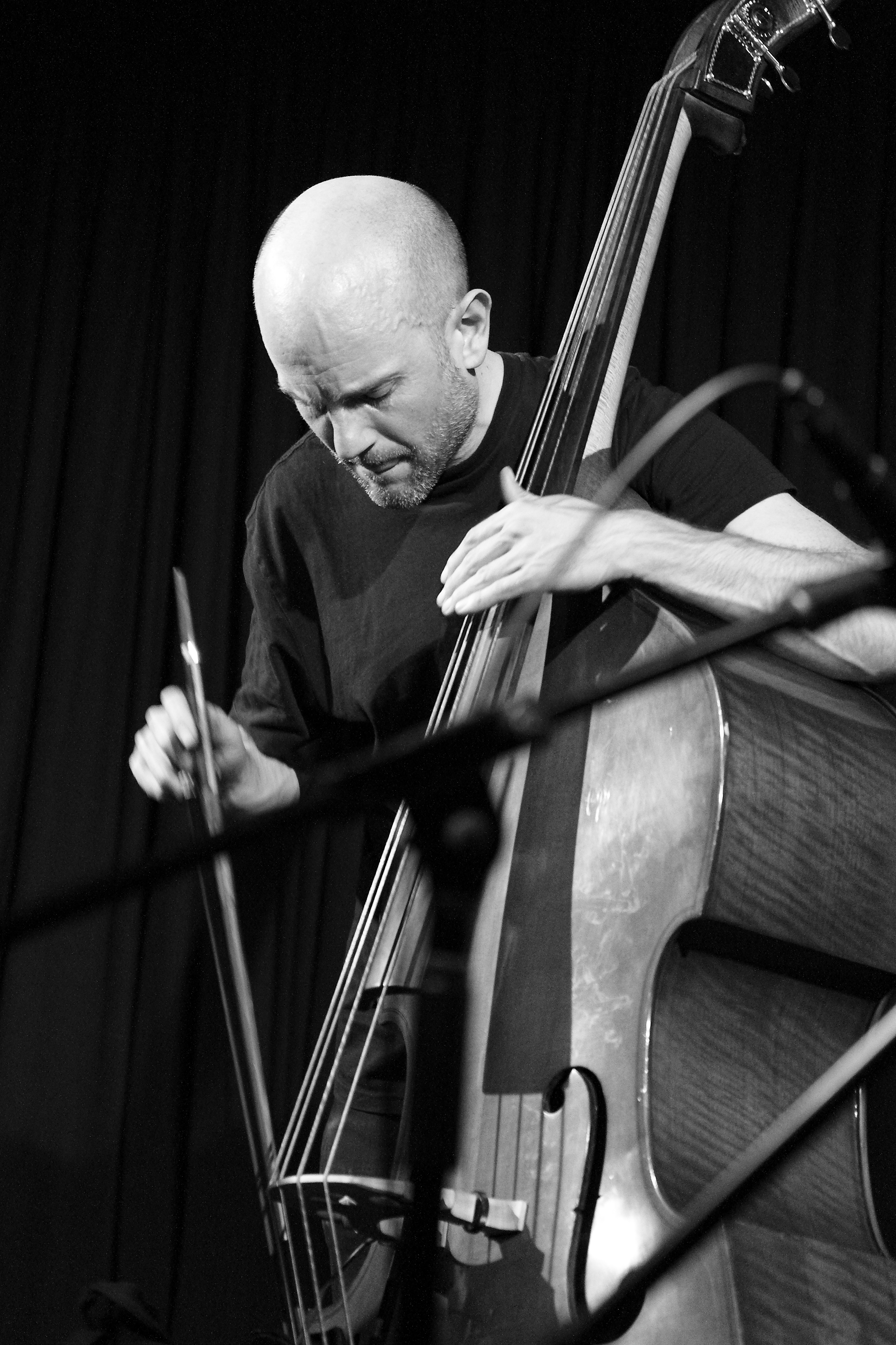 Das Arashi Trio (dt: Sturm) sind Johan Bertling (db), Paal Nilssen-Love (dr) & Akira Sakata (sax, cl, voc). Hier der Auftritt im Club W71 in Weikersheim.